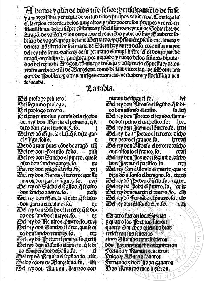 Cronica d[e] Aragon / [Gualberto Fabricio de Vagad] / Roderic: Repositori de contingut lliure